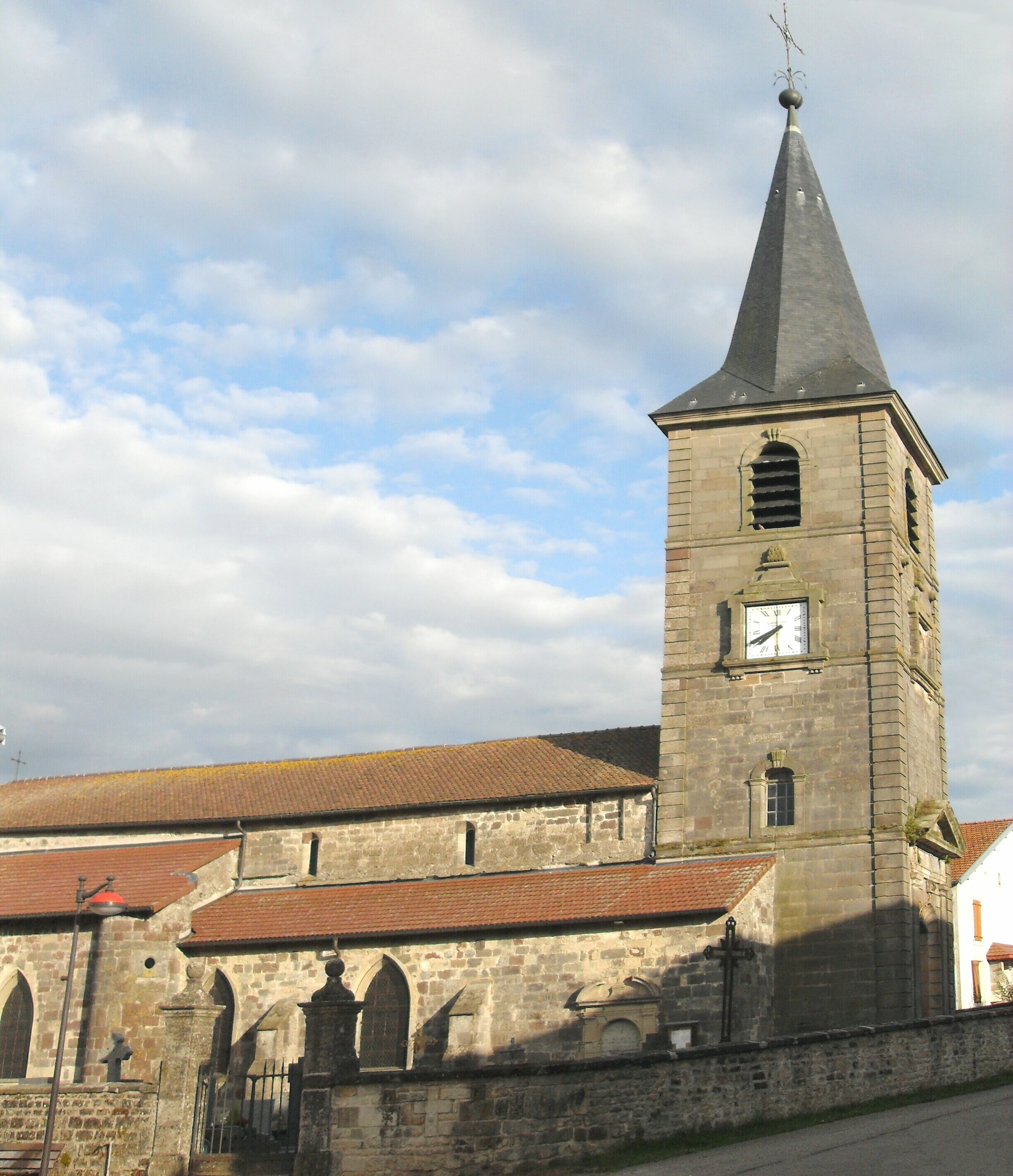 L'église fortifiée Saint-Brice à Dombrot-le-Sec